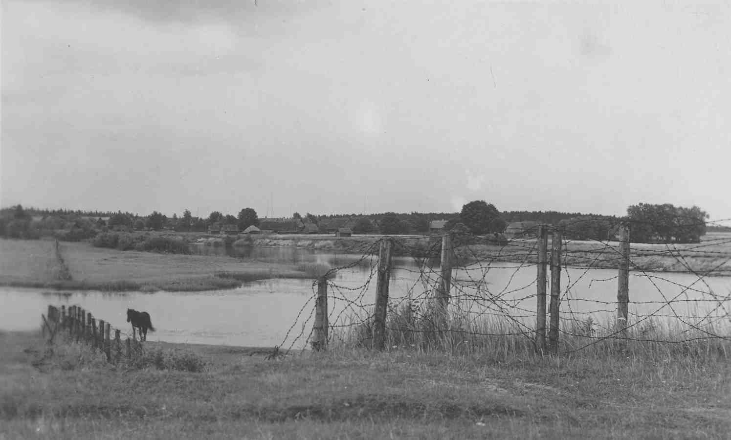 Деревня Новая Арсия. Советско-эстонская граница.